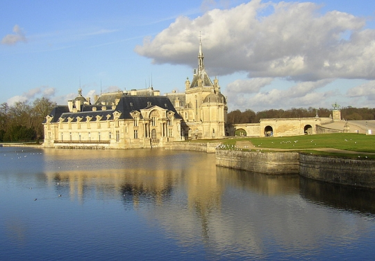 Le chateau de Chantilly